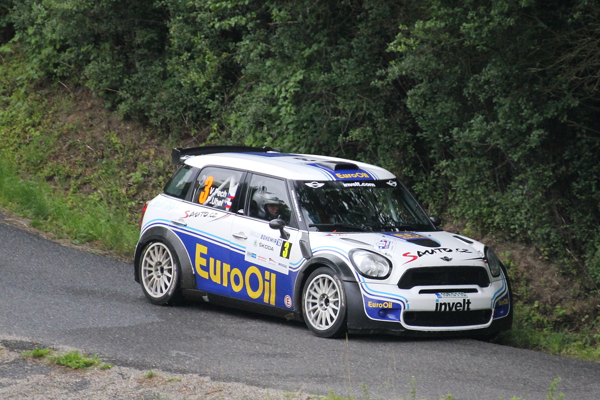 MINI John Cooper Works 1.6 Turbo, Rally Bohemia 2012